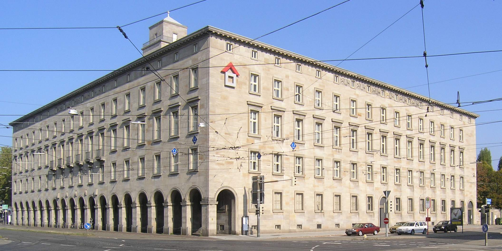 Oberpostdirektion Karlsruhe, 1938 von Hermann Billing